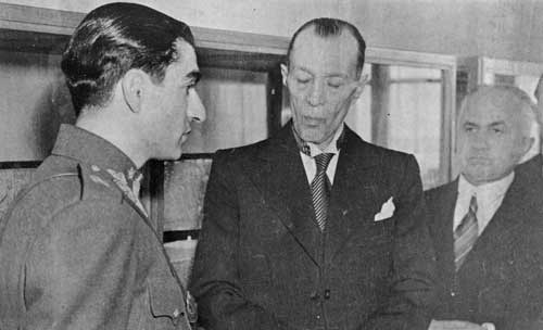 محمدرضا پهلوی و ملک الشعرای بهار